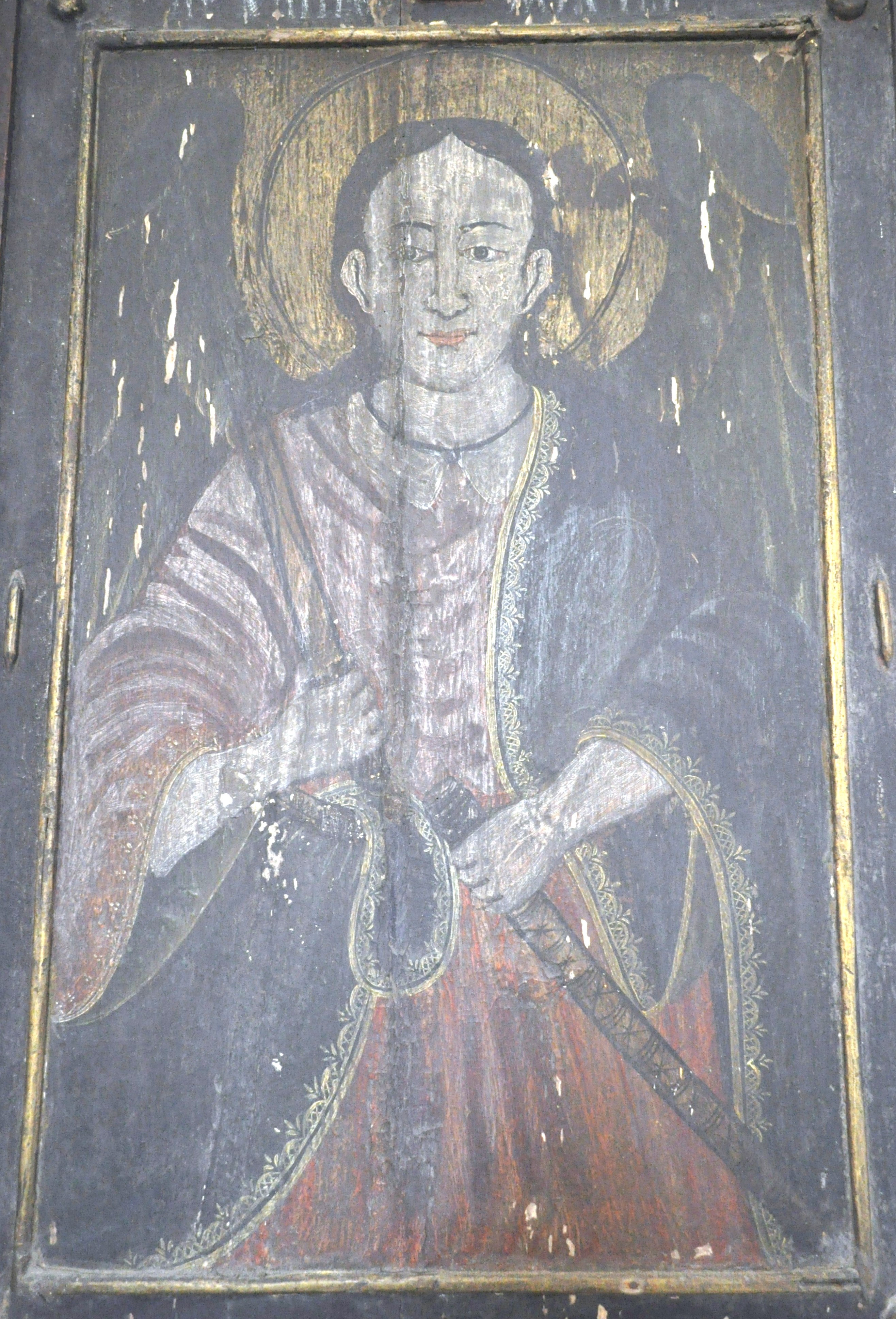 Biserica "Adormirea Maicii Domnului" a mănăstirii Vadului , sat Vad, județul Cluj